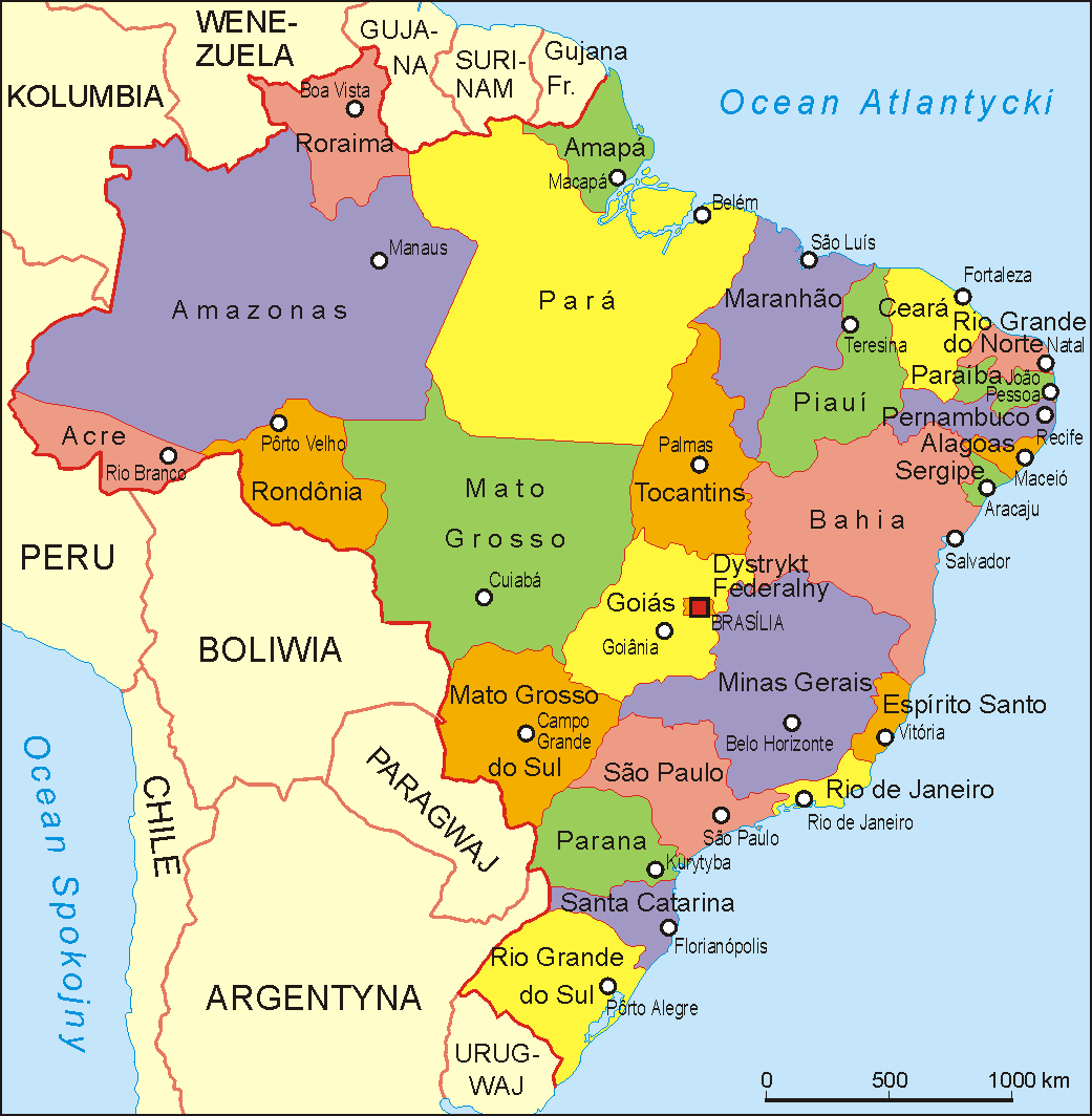 Mapa administracyjna Brazylii. Autor Aotearoa